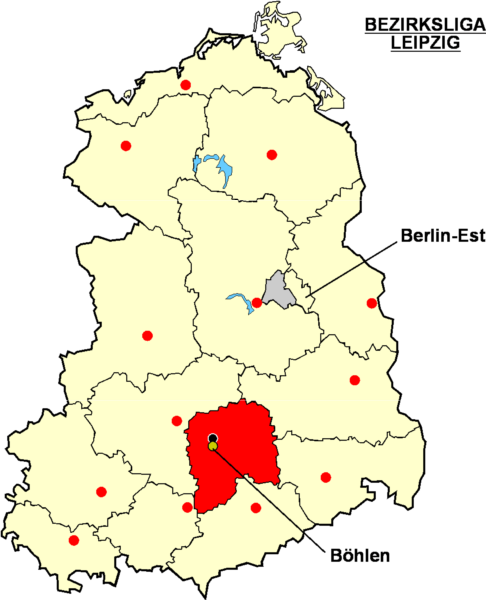 Localisation de Böhlen dans la "Bezirksliga Leipzig" Catégorie:Logo de clubs de football - Allemagne